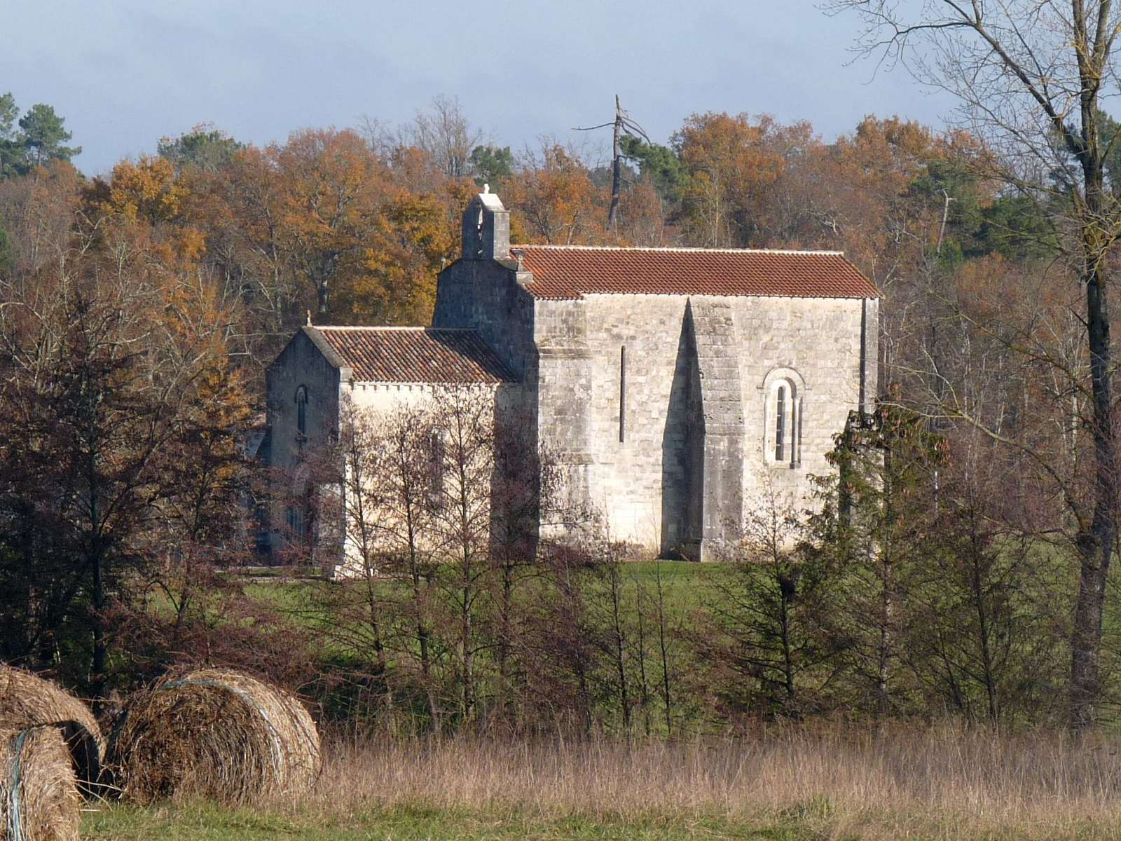 église-commanderie du Tâtre, Charente, France